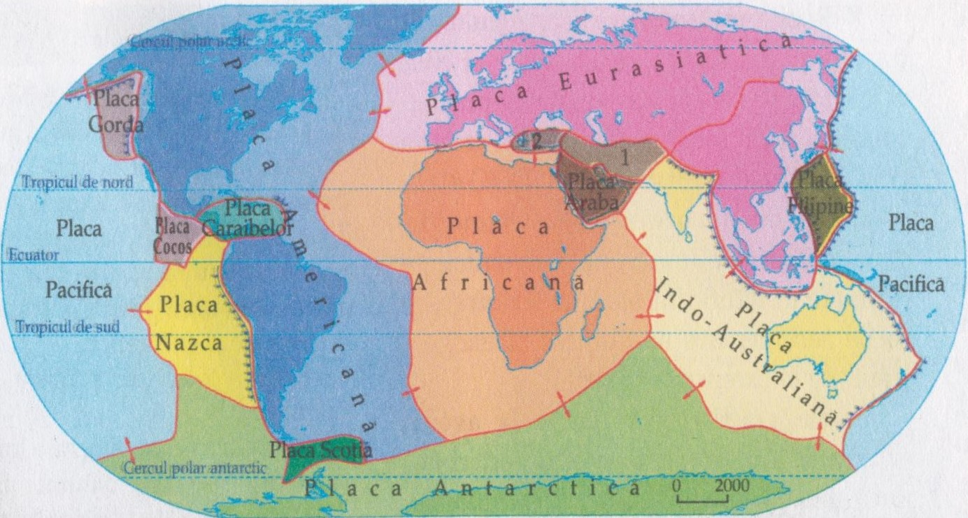 Placile tectonice